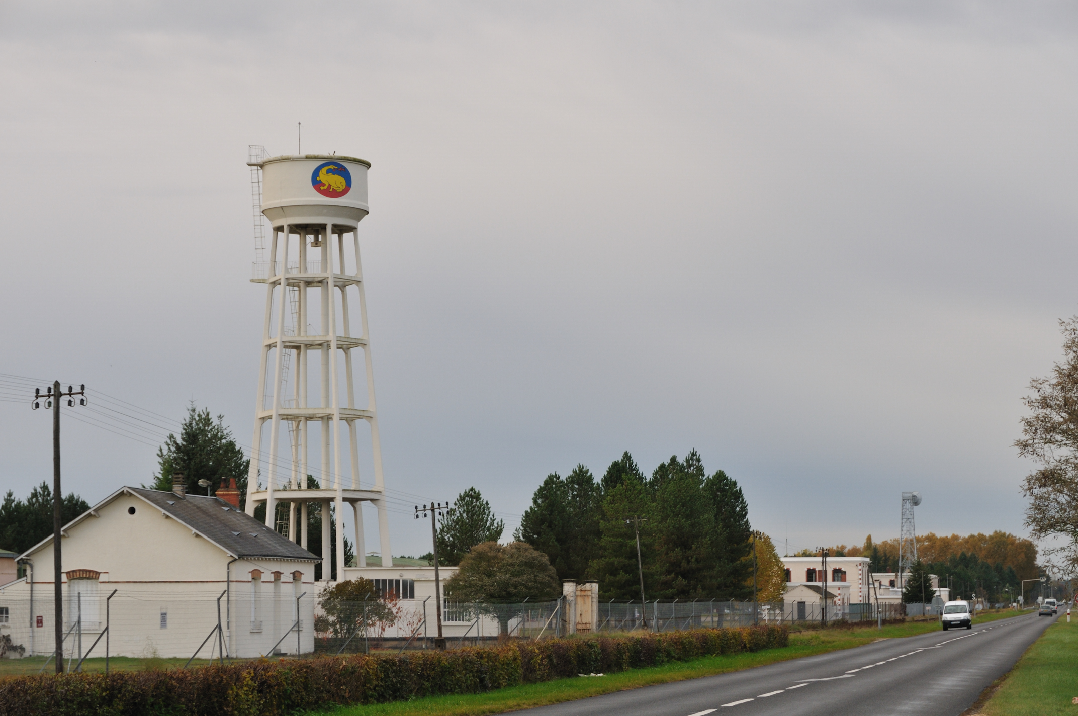 Base aérienne 273, route de Selles, Romorantin-Lanthenay, Loir-et-Cher, France